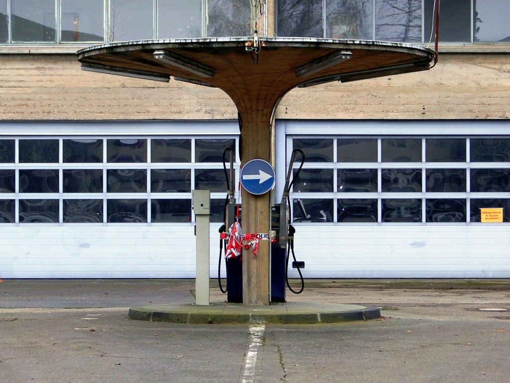 Luxembourg-Verlorenkost, bâtiments de l'ancienne Gendarmerie, aujourd'hui Police Grand-Ducale